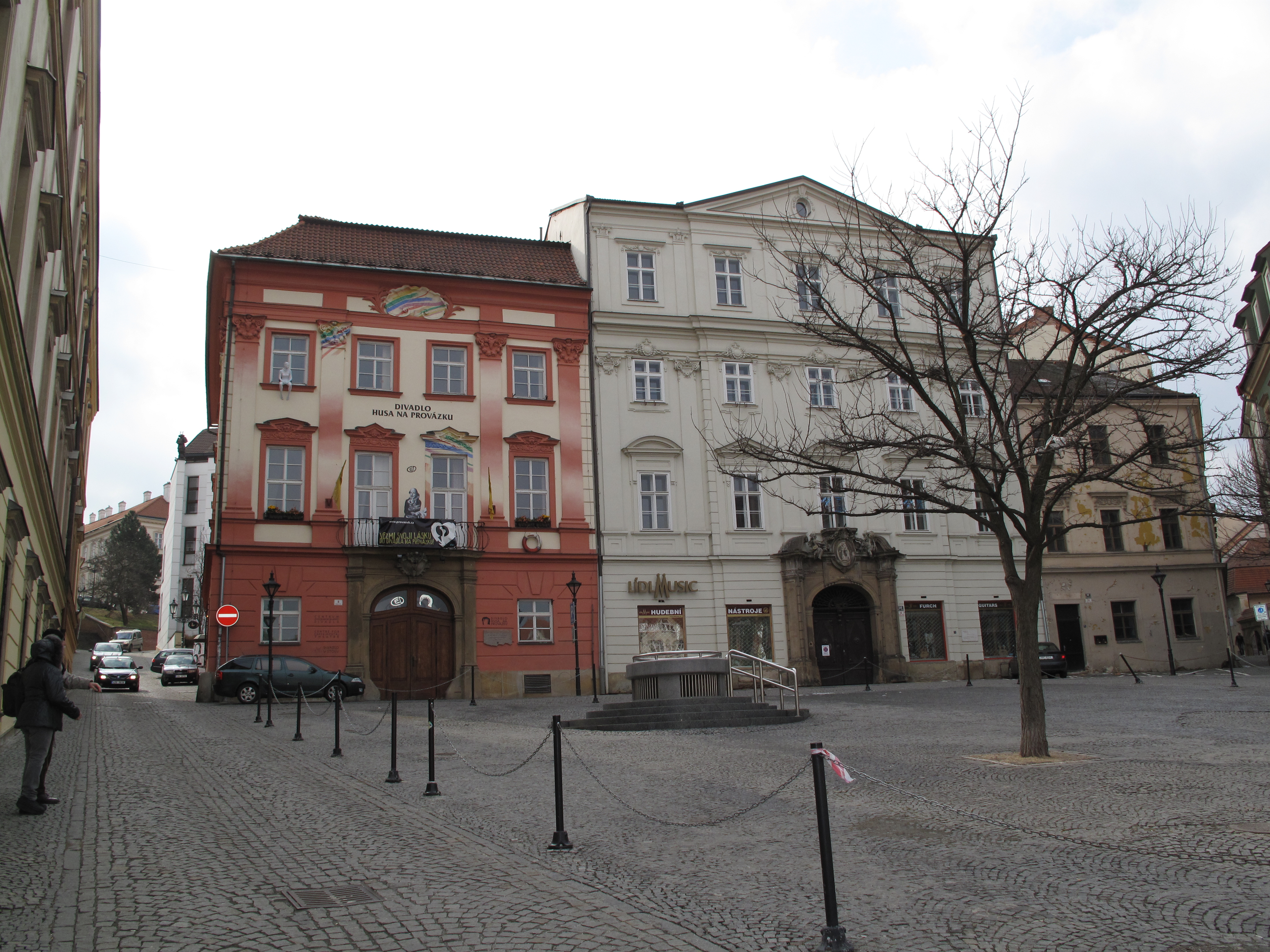 Brno začátkem roku 2010